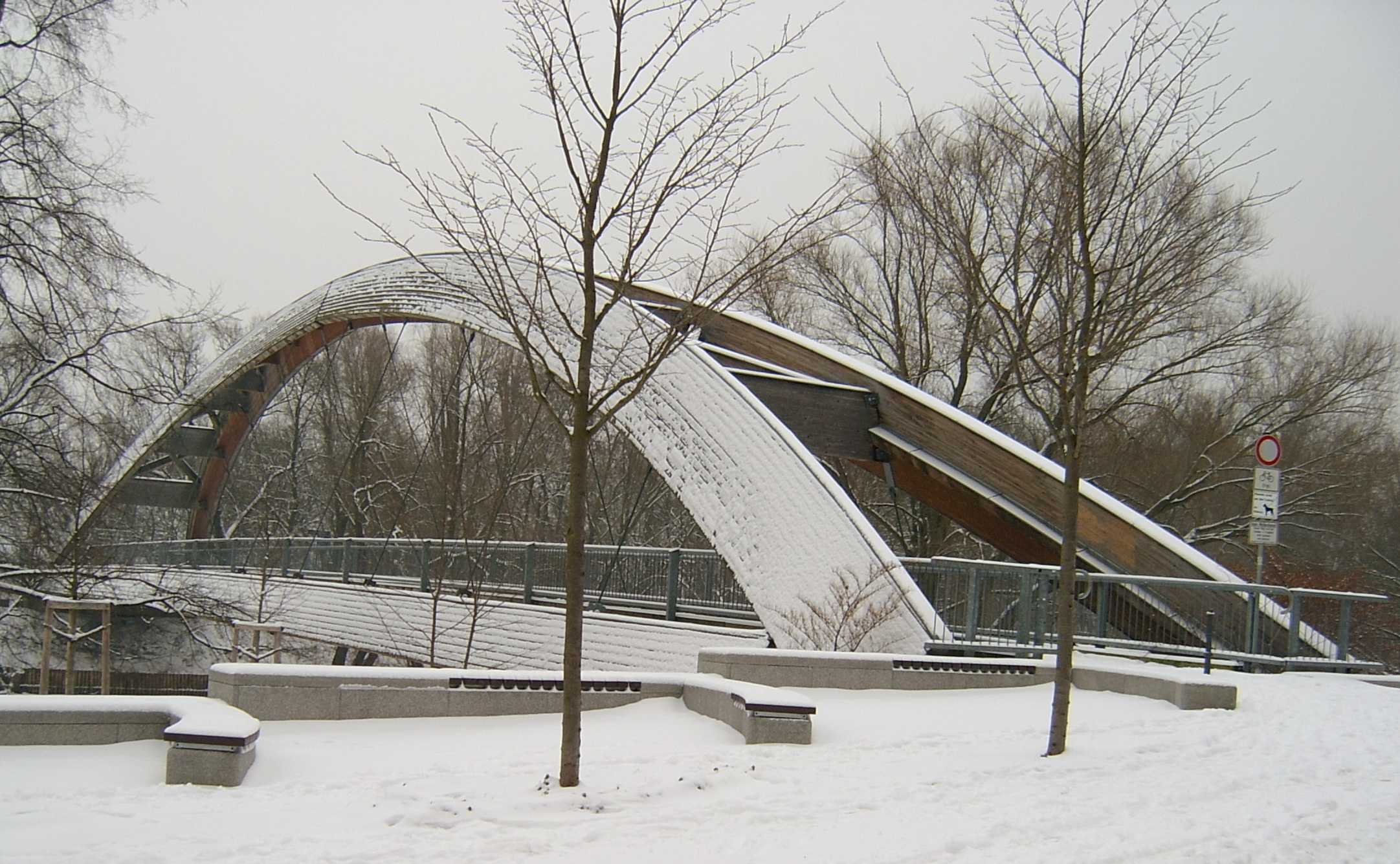 Brücke zum Ziegenwerder in Frankfurt (Oder).